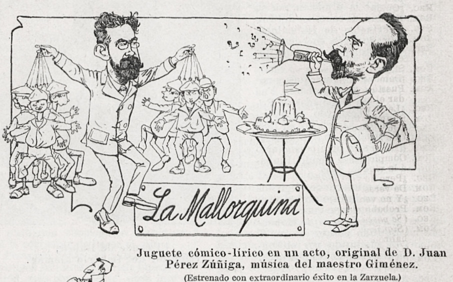 Teatro de la Zarzuela. La Mallorquina. Juguete cómico-lírico en un acto, original de D. Juan Pérez Zúñiga, música del maestro Giménez